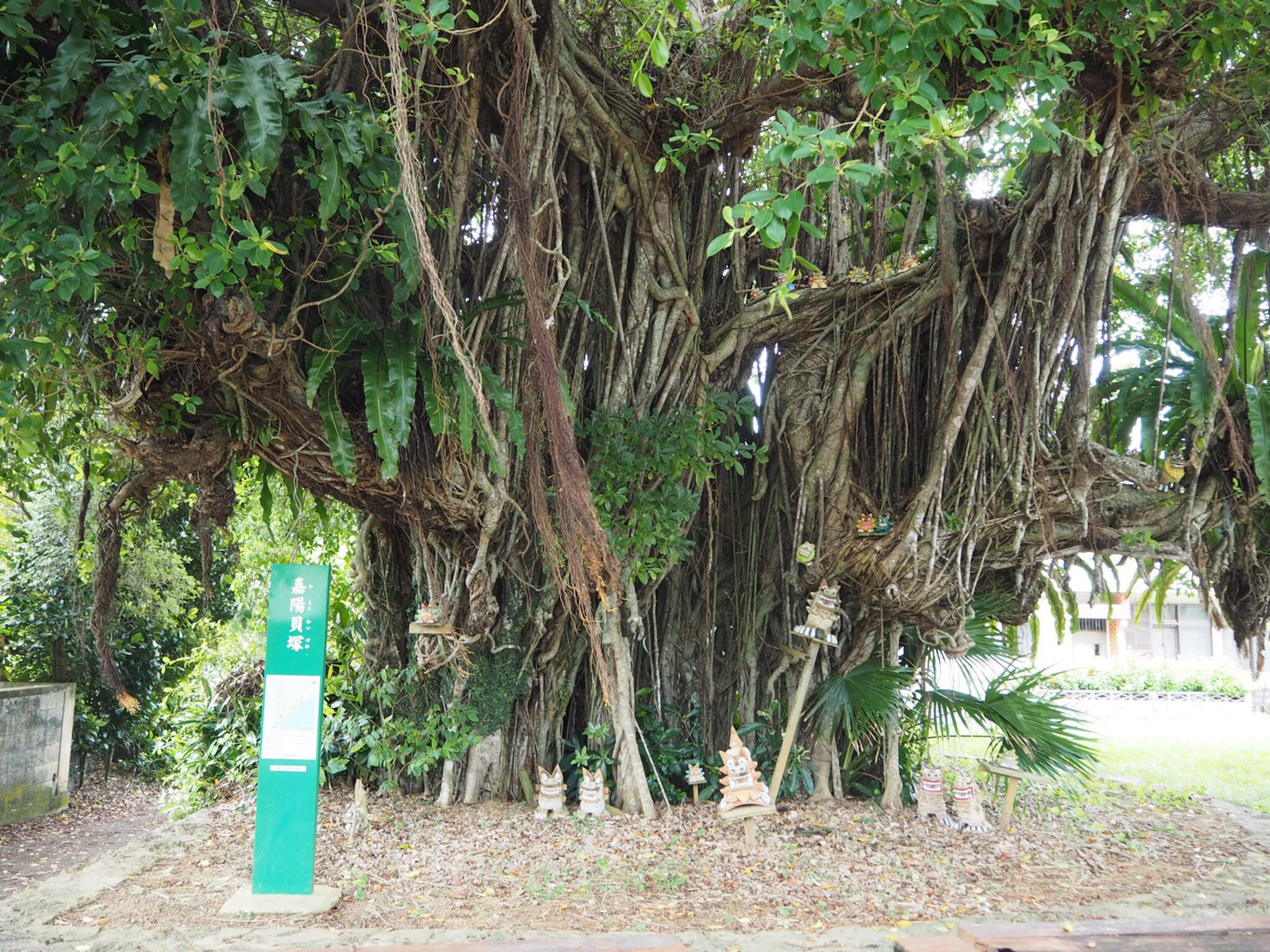 嘉陽のガジュマルの木